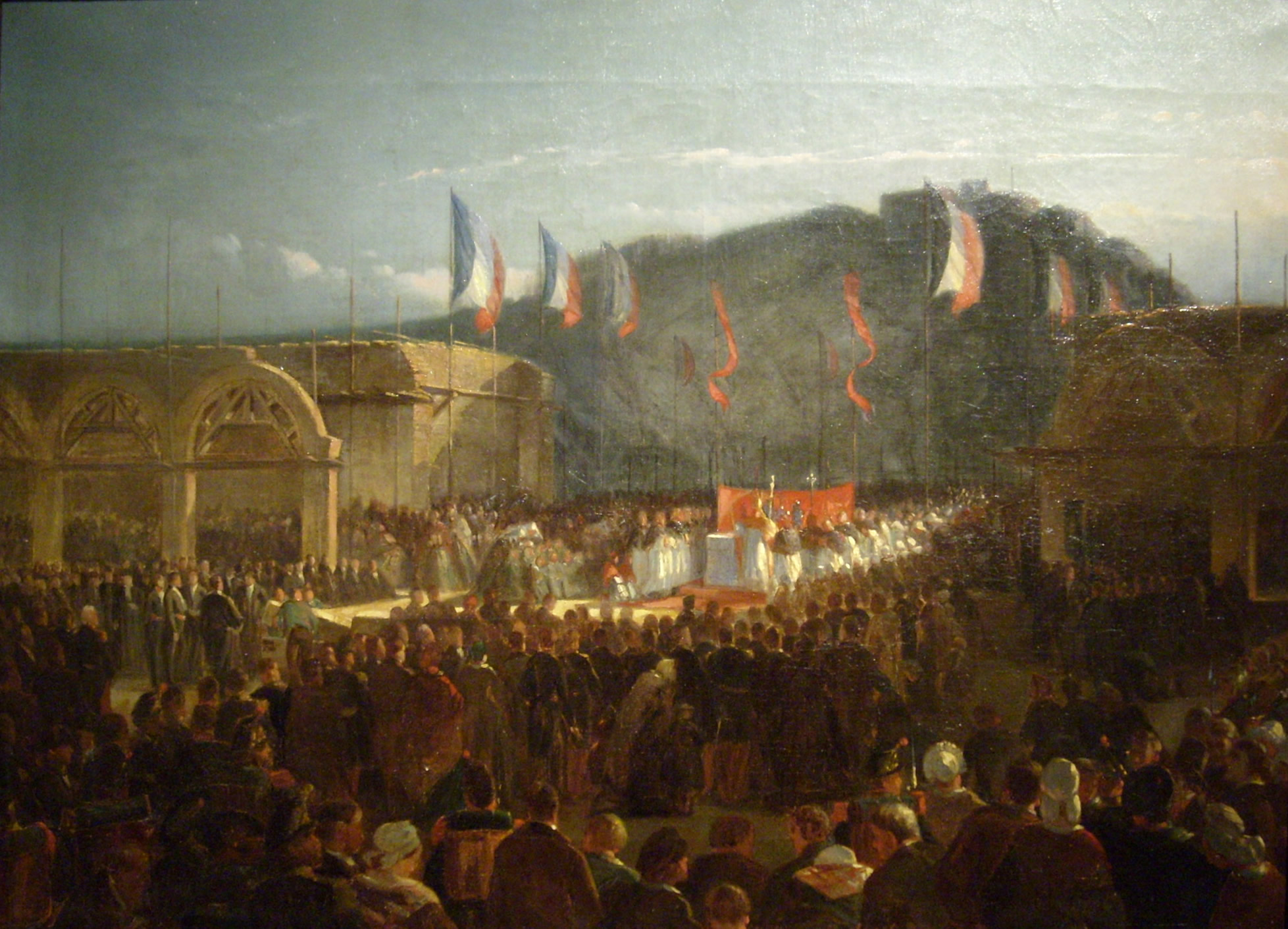 Musée Thomas-Henry, Cherbourg-Octeville - Pose de la première pierre de l'Hôtel-Dieu à Cherbourg, Armand-Auguste Fréret